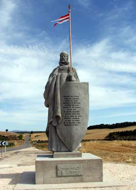 Estatua del Cid en la localidad burgalesa de Mecerreyes